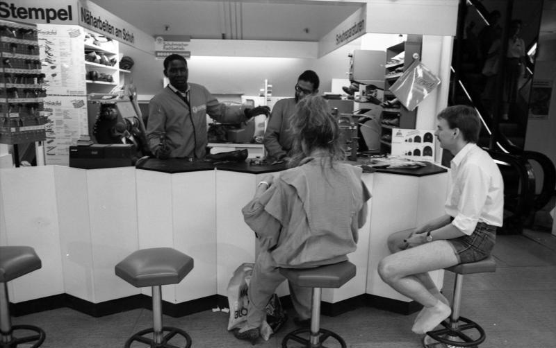 Juni 1988 Bonn, Kaufhof